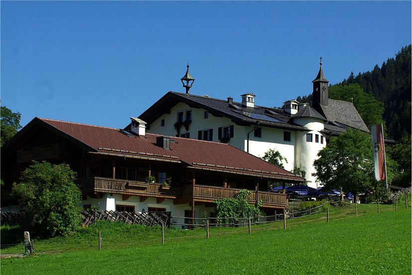 Schlossanlage, Schloss Kammer